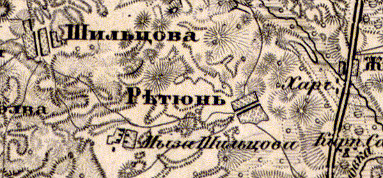 Деревни Шильцова и Ретюнь, мыза Шильцова на карте 1863 года.